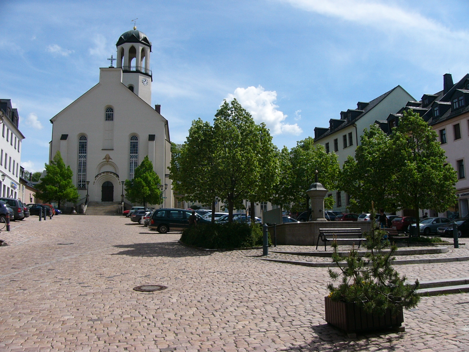 Marktplatz in Auerbach